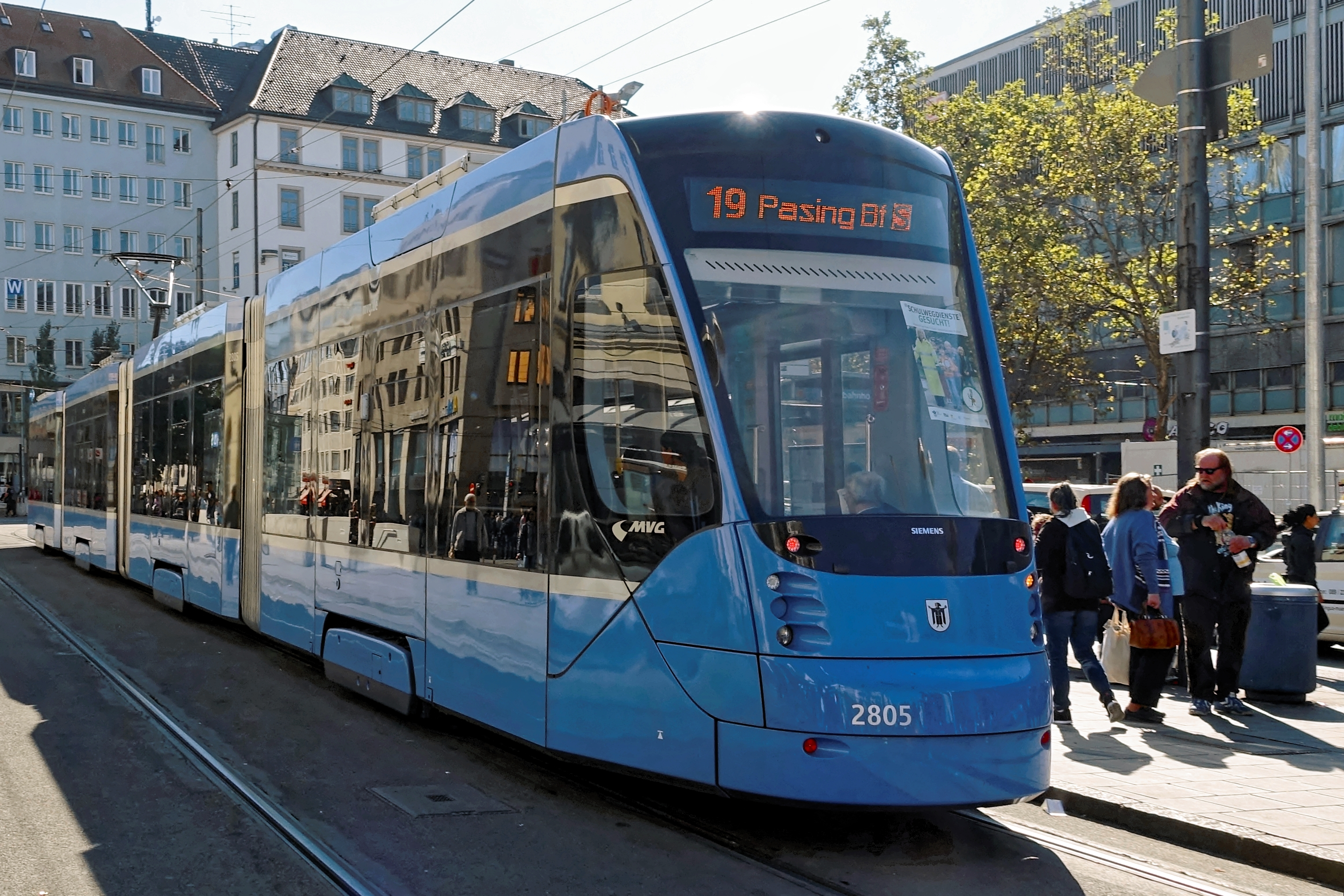 Die Rückseite des Münchner Avenios 2805 am Hauptbahnhof am 21. September 2015 auf der Strecke der Tram 19 in Richtung Pasing Bahnhof.